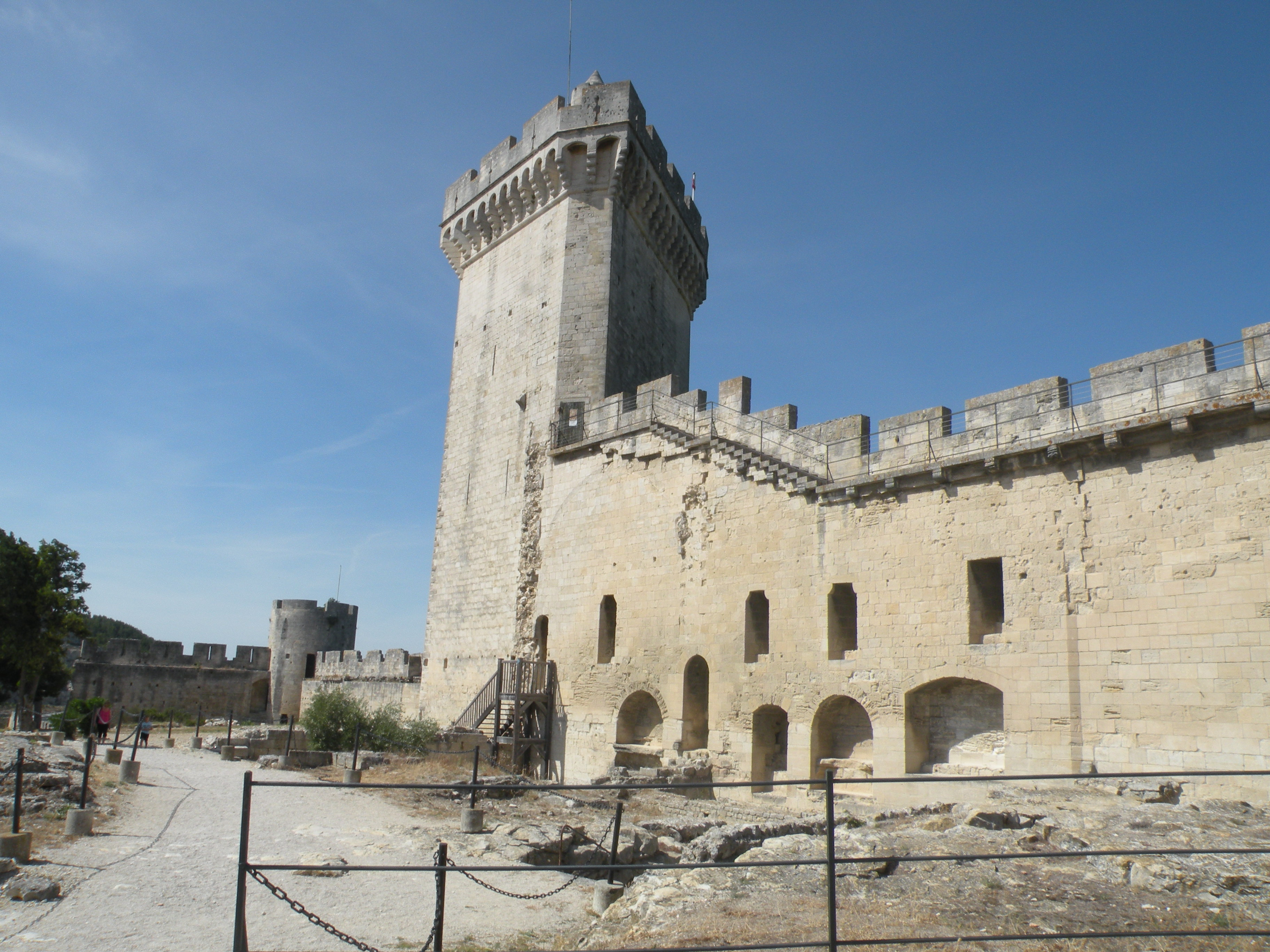 donjon Château de Beaucaire (Gard)